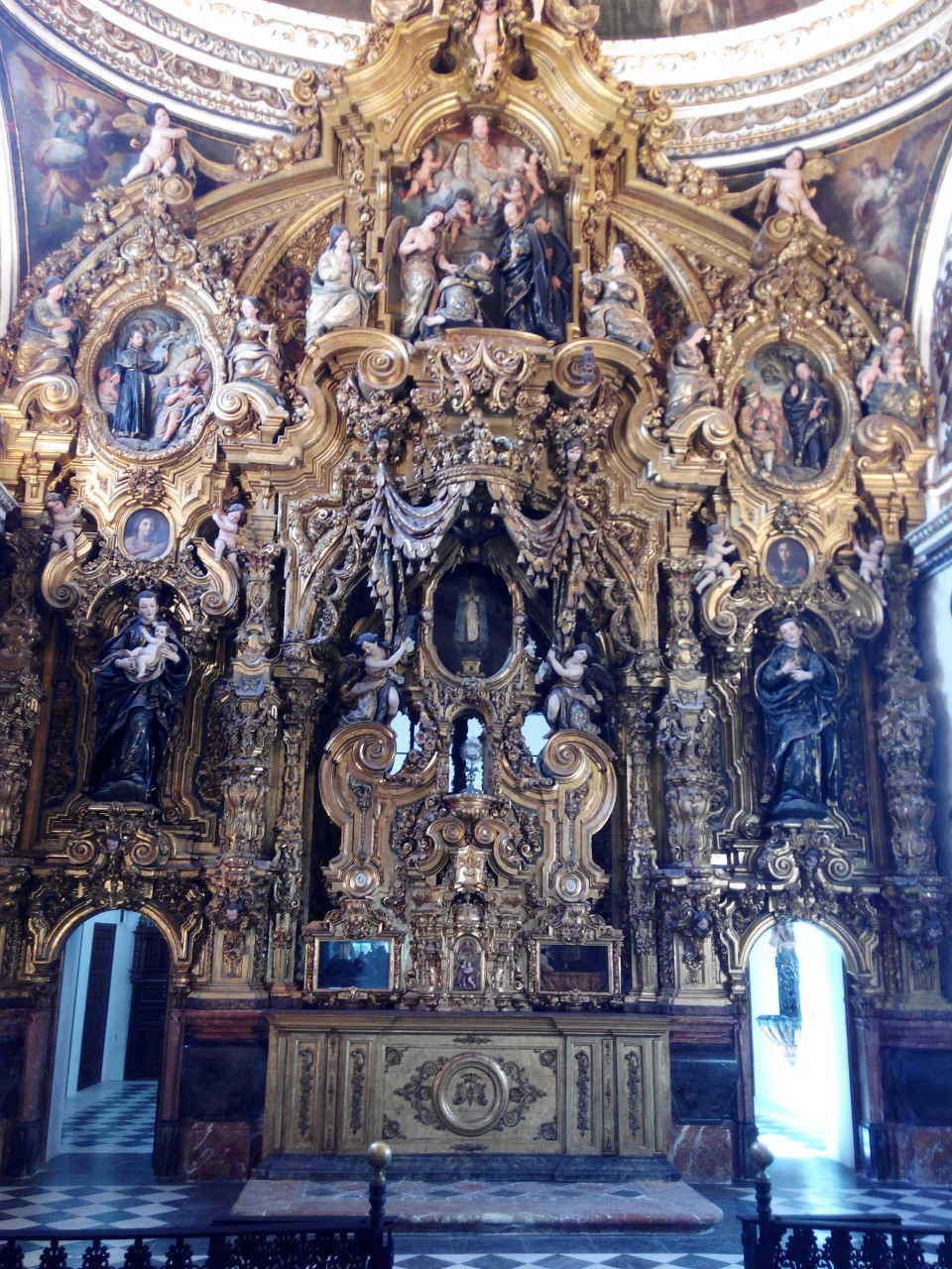 Retablo de la Capilla Doméstica del noviciado jesuita aledaño a la Iglesia de San Luis de los Franceses de Sevilla